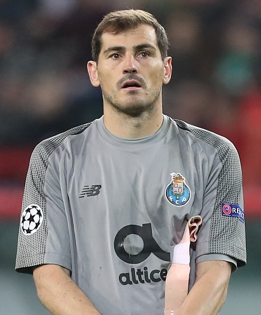 Iker Casillas con el Oporto en 2018.